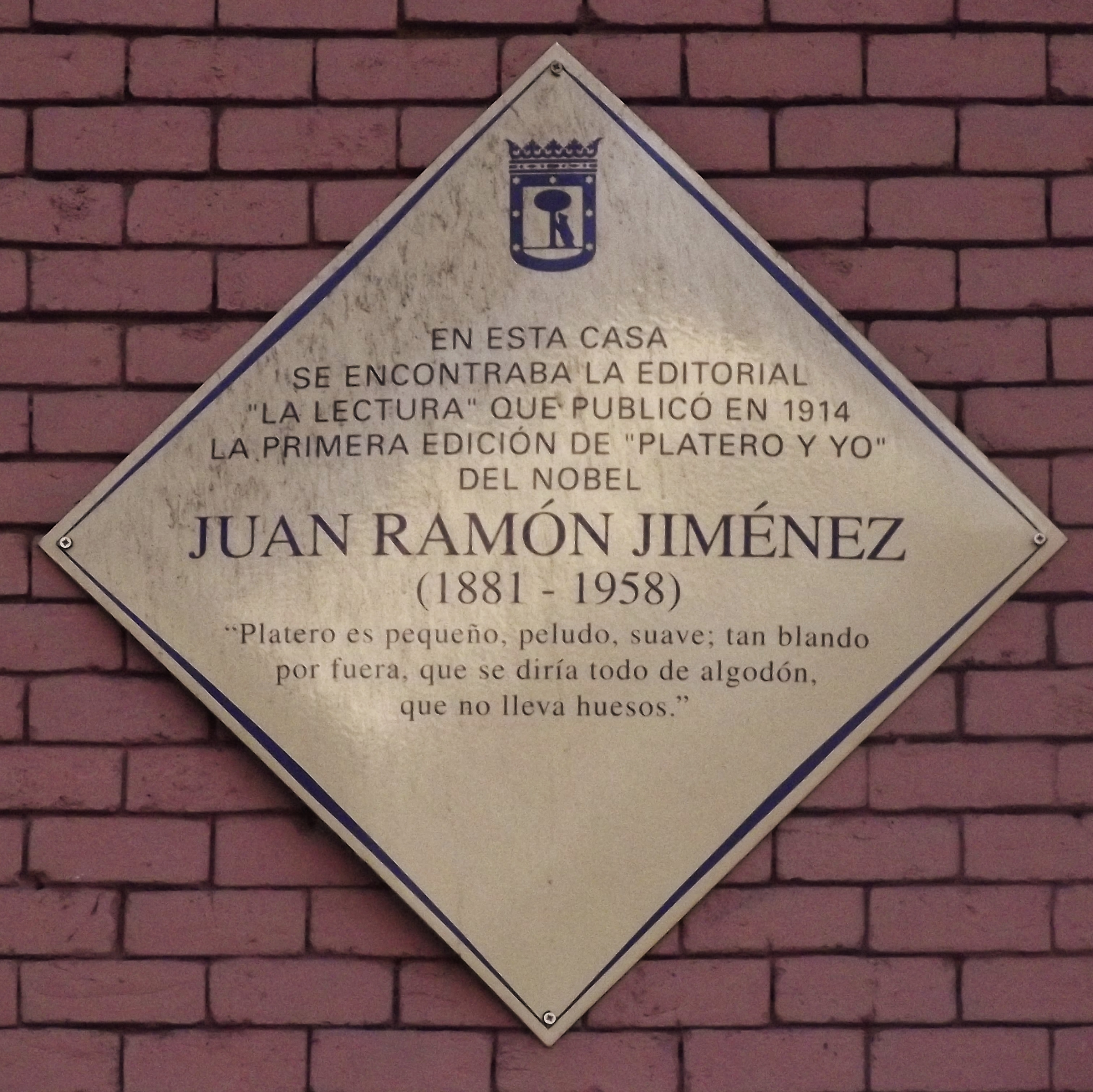 En esta casa se encontraba la editoral "La Lectura" que publicó en 1914 la primera edición de Platero y Yo" del Nobel Juan Ramón Jiménez (1881-1958). La placa se colocó en 2014 donde hoy se encuentra la Fundación Mapfre. Fuente: Aquí